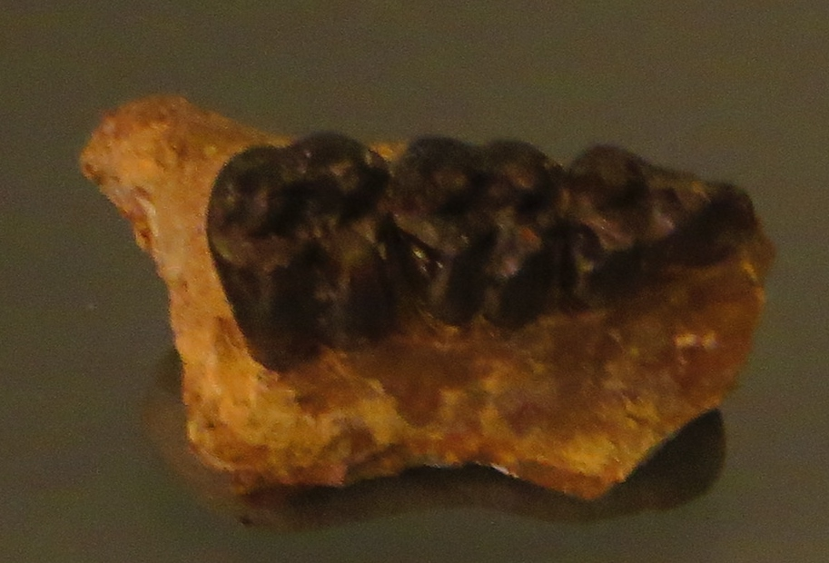 Fossil - Took the picture at Museum of Natural History Zurich